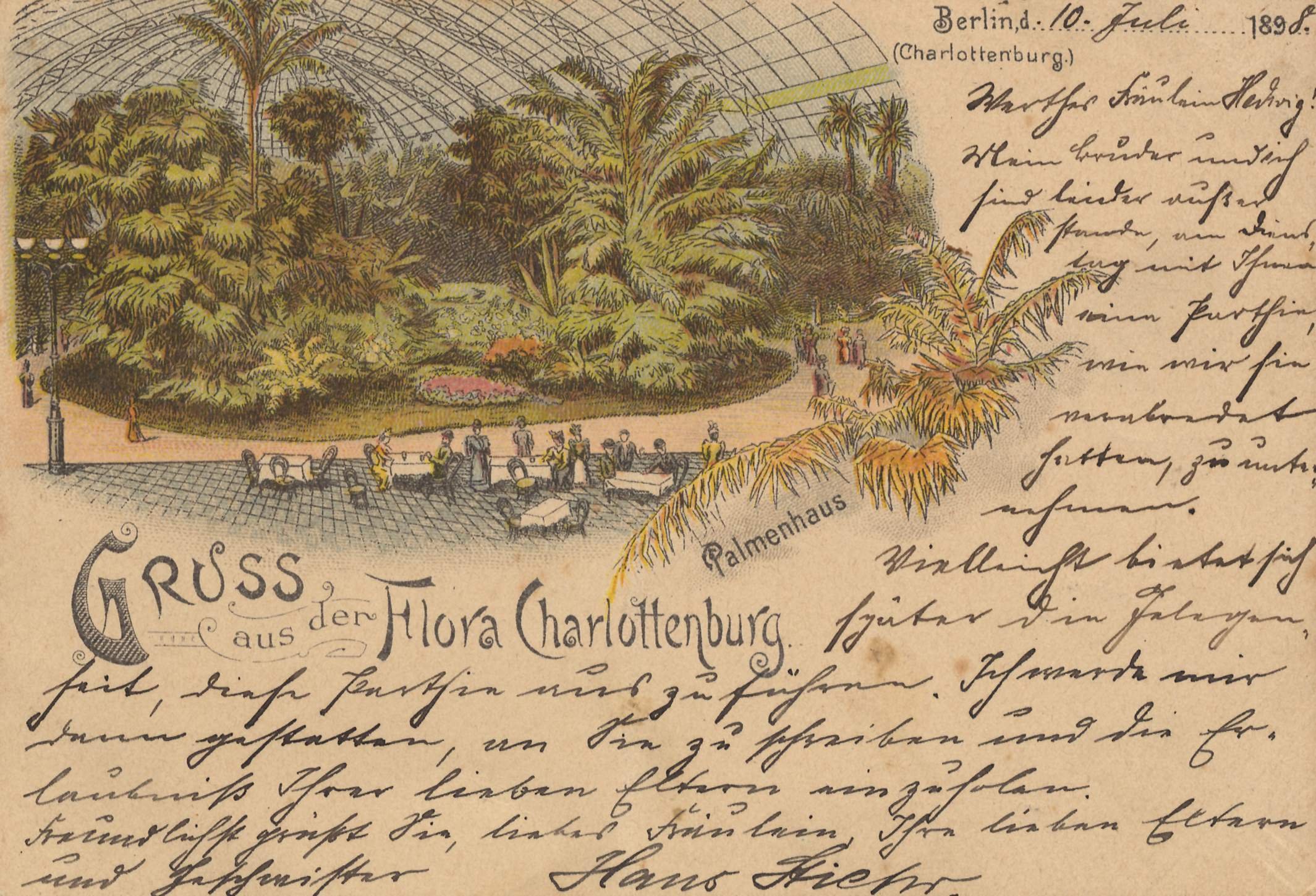 Der Vergnügungspalast Flora in Charlottenburg. Das Gebäude wurde 1874 errichtet. Es befand sich auf dem Gelände zwischen Charlottenburger Ufer, Brauhofstraße und Otto-Suhr-Allee und wurde 1904 gesprengt.v